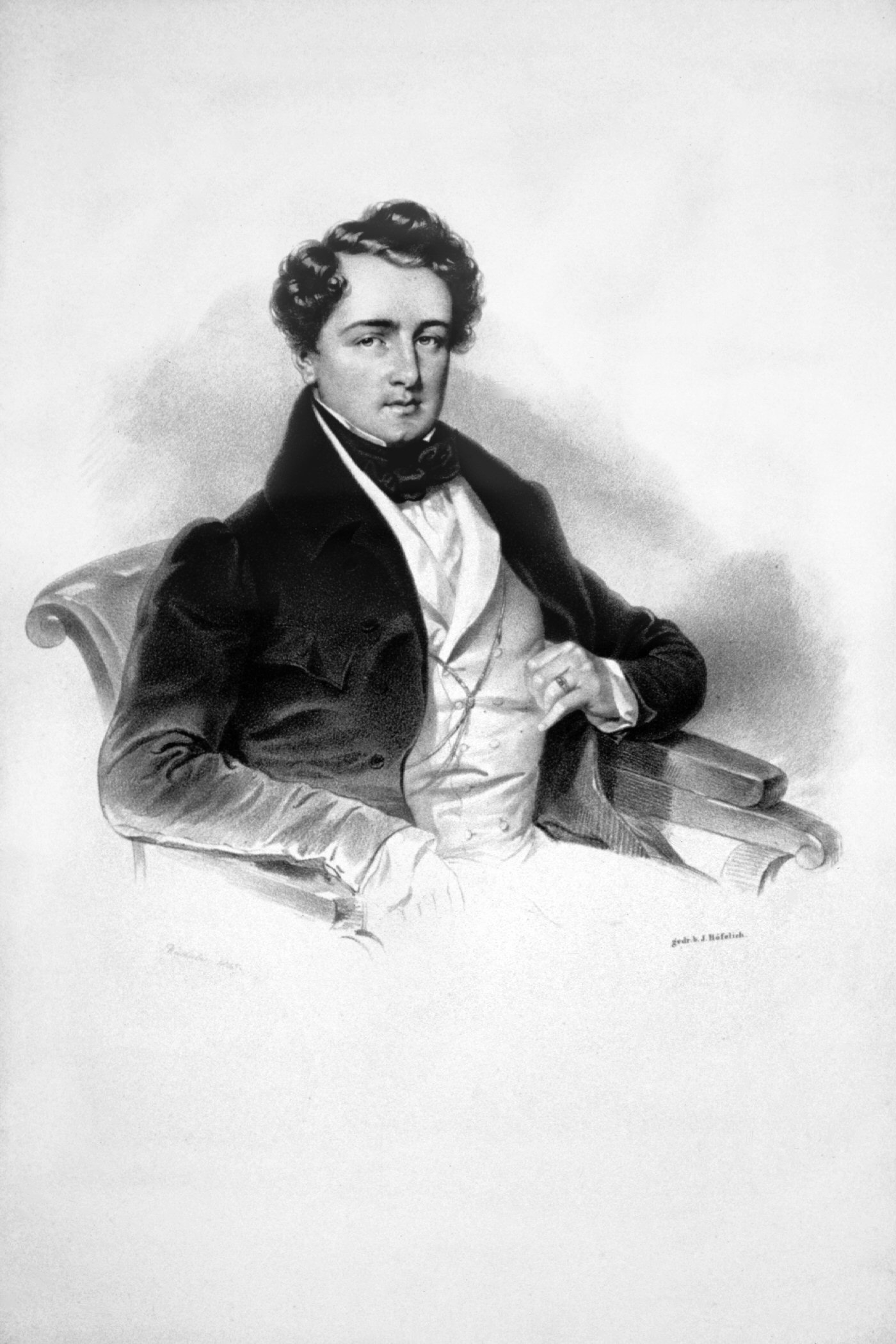 Vincenz Karl von Auersperg (1812-1867), Fürst. Geheimrat, Mitglied des Herrenhauses, Leiter der Hoftheater. Lithographie von Josef Kriehuber, 1835